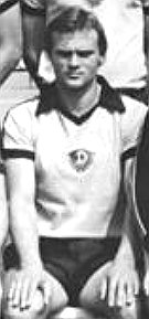 Title: Mannschaftsfoto SG Dynamo Dresden Factual corrections and alternative descriptions are encouraged separately from the original description. Additionally errors can be reported at this page to inform the Bundesarchiv. Original historic description: ADN-ZB-Häßler-8.10.82-zin-Dresden: Die Fußball-Oberligamannschaft SG Dynamo Dresden für die Spielserie 1982-83. Der Vizemeister und Pokalsieger der Saison 1981-82 möchte in der neuen Spielserie an die Erfolge des Vorjahres anknüpfen und vor allem seine spielerischen und kämpferischen Potenzen vervollkommnen. Das Aufgebot der Elbestädter: Hintere Reihe vl.n.r.: Dirk Losert, Matthias Döschner, Andreas Mittag, Karsten Petersohn, Ralf Minge, Andreas Trautmann, Udo Schmuck und Mannschaftskapitän Hans-Jürgen Dörner. vordere Reihe v.l.n.r.: Andreas Schmdit, Steffen Lachmann, Reinhard Häfner, Frank Schuster, Torhüter Bernd Jakubowski, Torhüter Jörg Klimpel, Hans-Uwe Pilz, Lutz Schülbe und Torsten Gütschow.